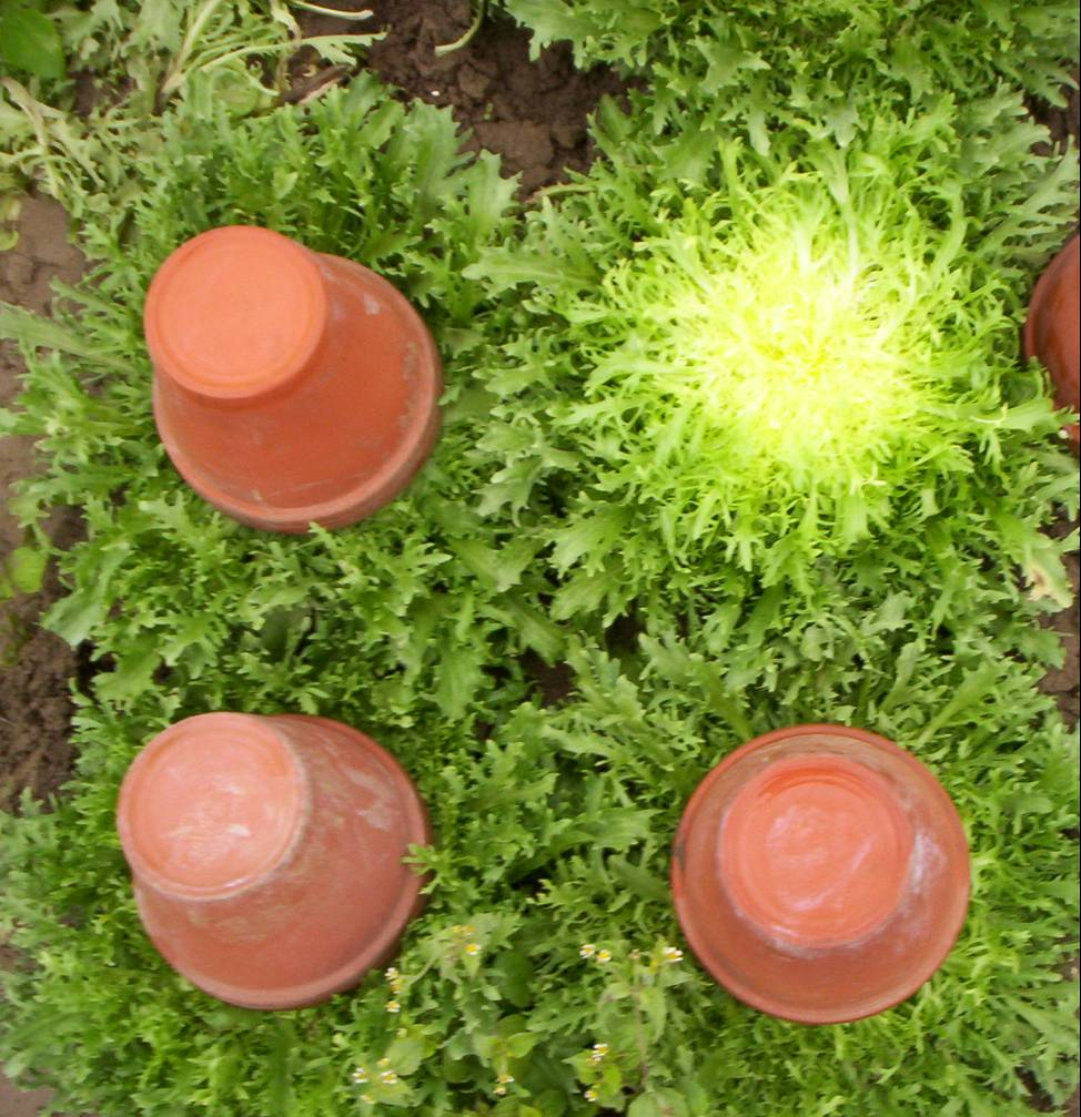 Chicorée frisée de variété Galia, accompagnée de son pot de blanchiment